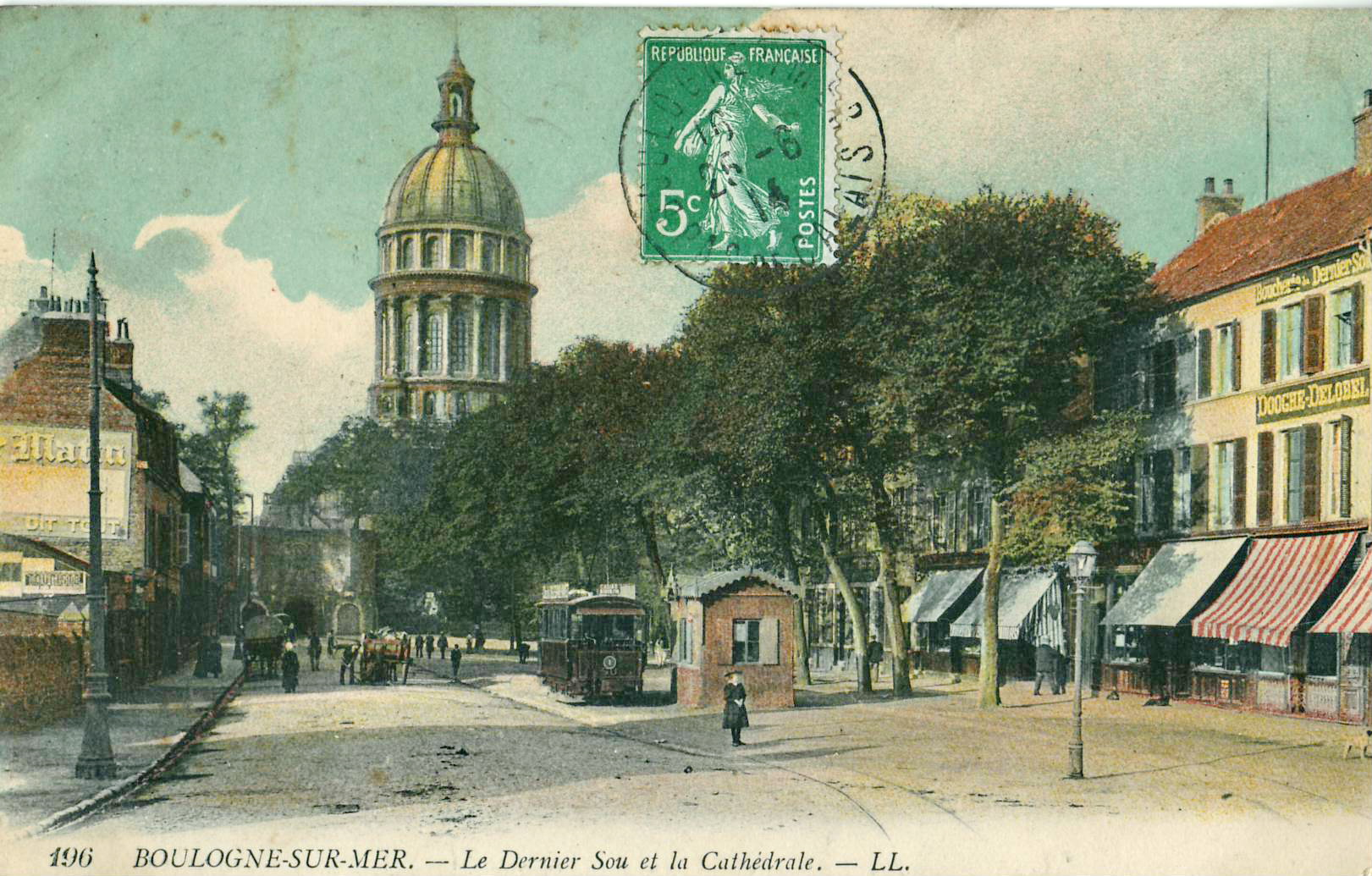 Carte postale ancienne é&ditée par LL, n°196 : BOULOGNE-SUR-MER - Le Dernier-sou et la Cathédrale